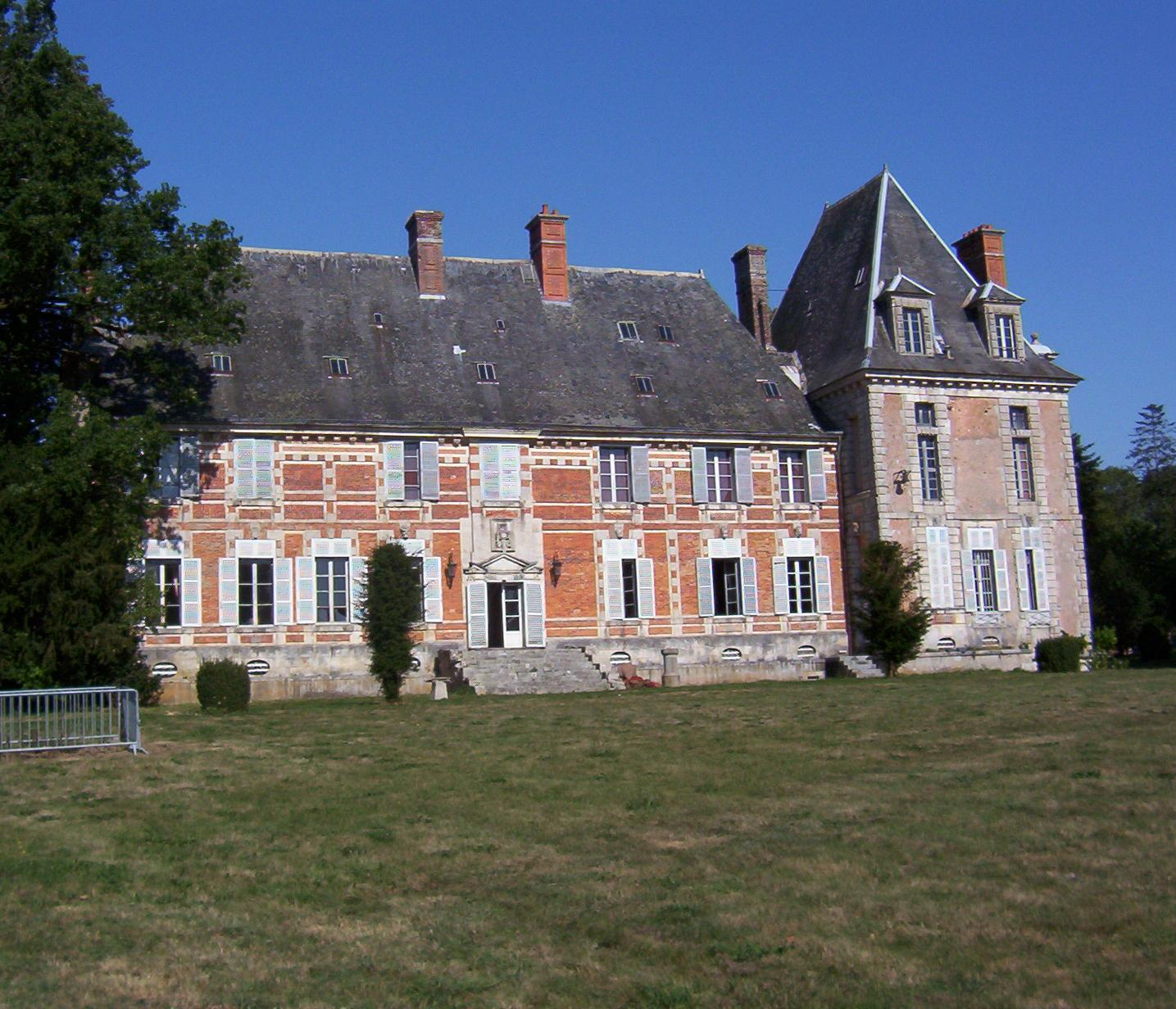 Château de Droué (vue Ouest)